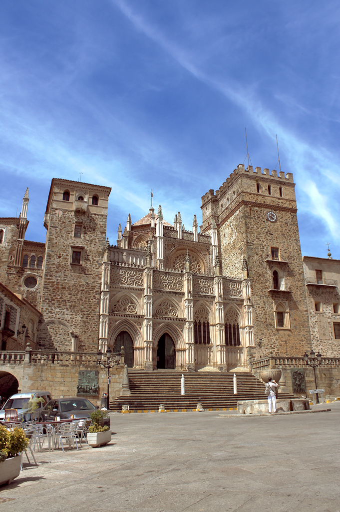 Fachada principal del monasterio de Guadalupe, provincia de Caceres, (España).